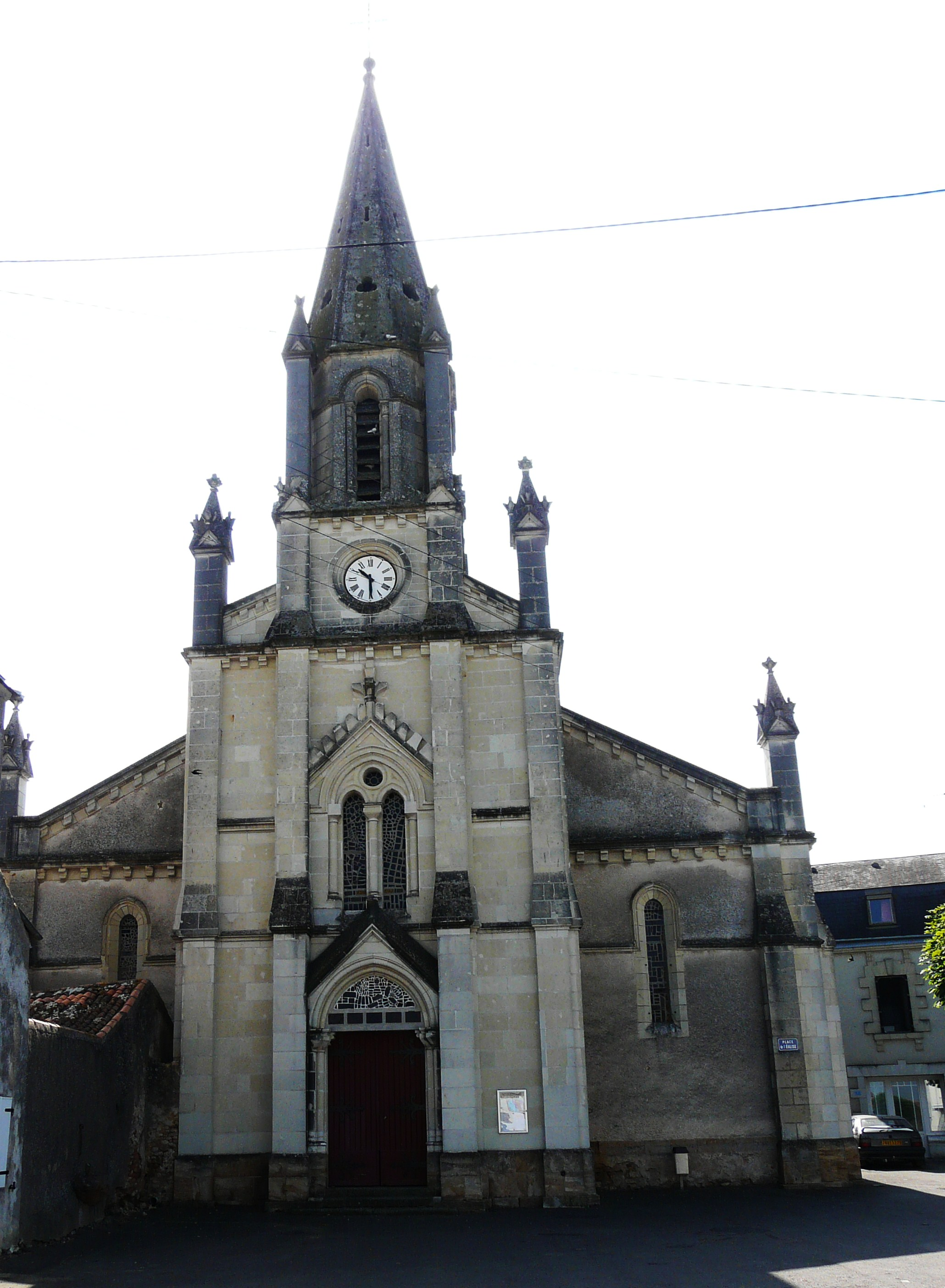 Église de Mauzé-Thouarsais